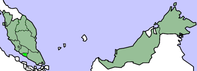 Malaysia Melaka map.